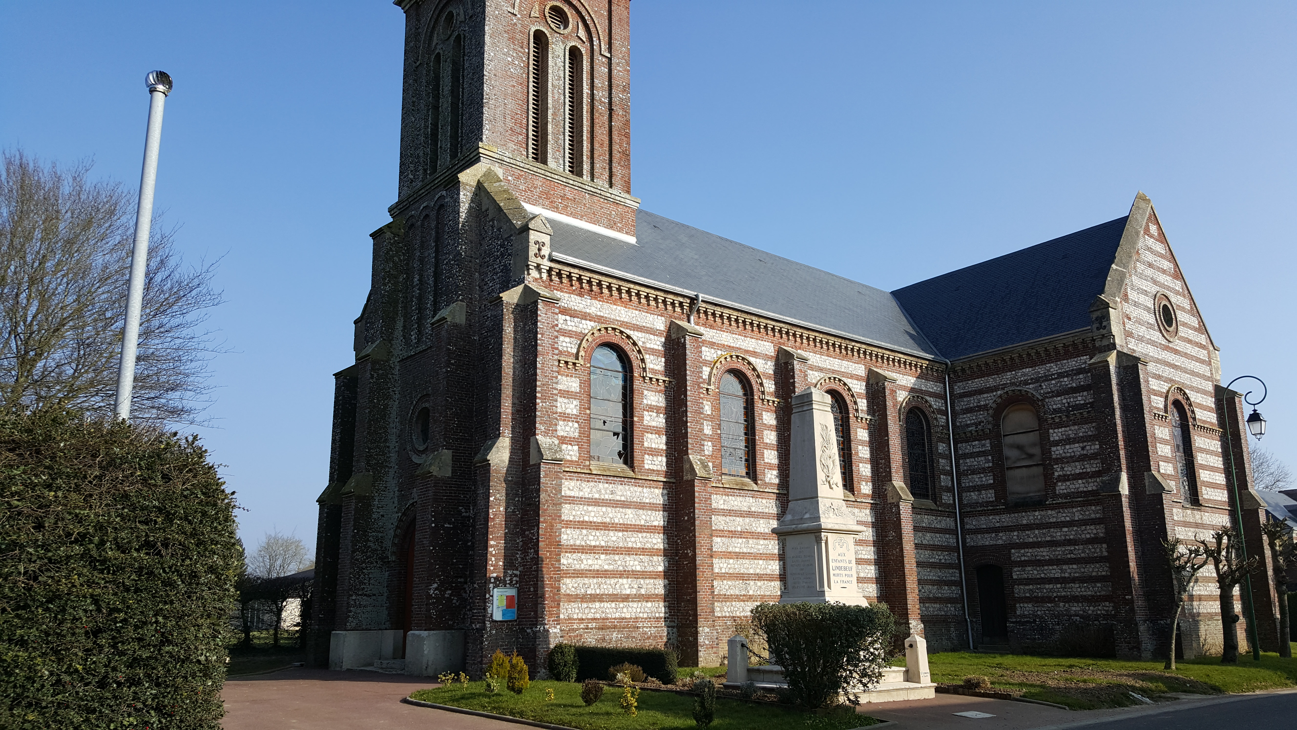 Eglise de Lindebeuf